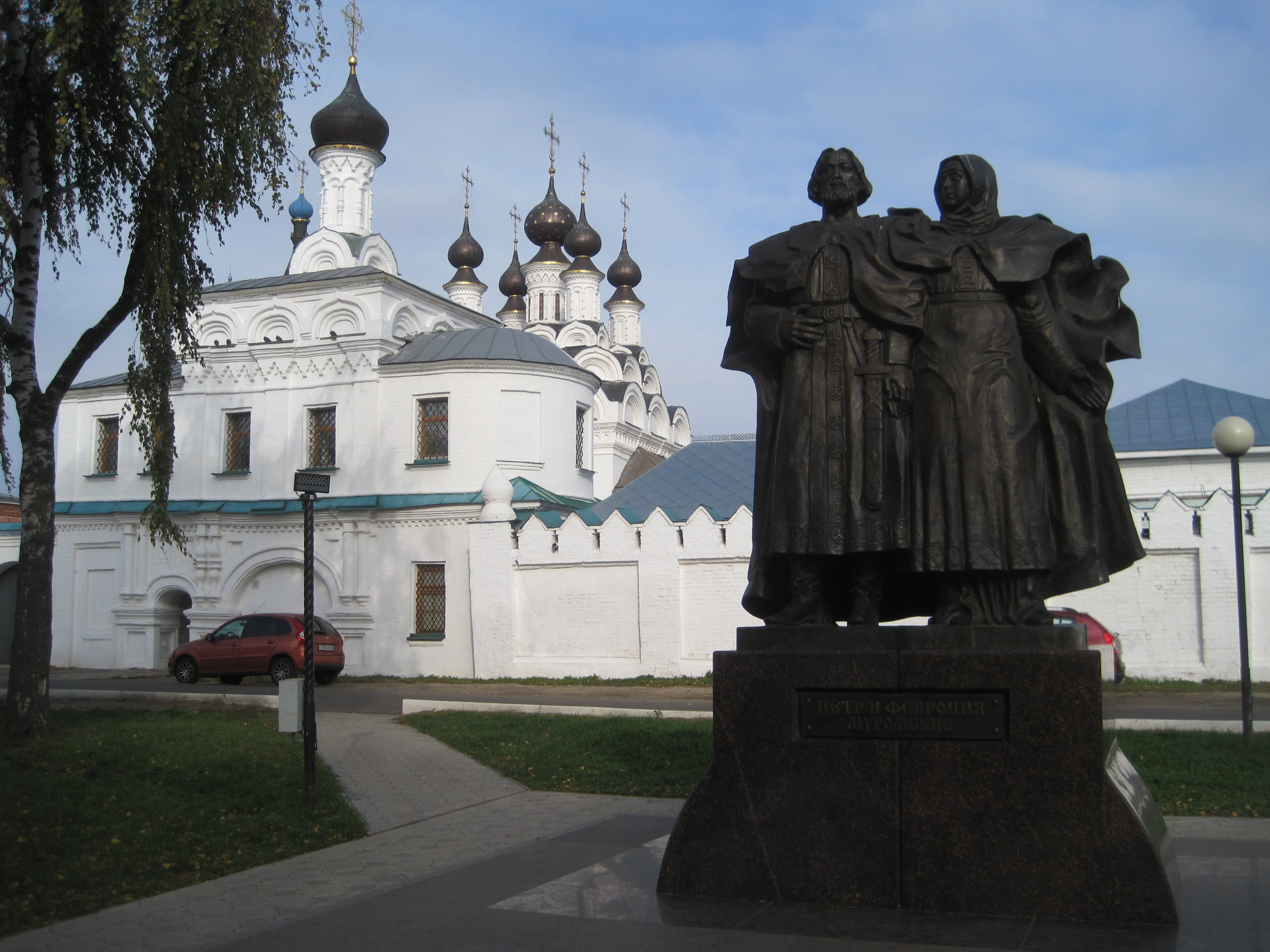 Statue devant le monastère de l'Annonciation